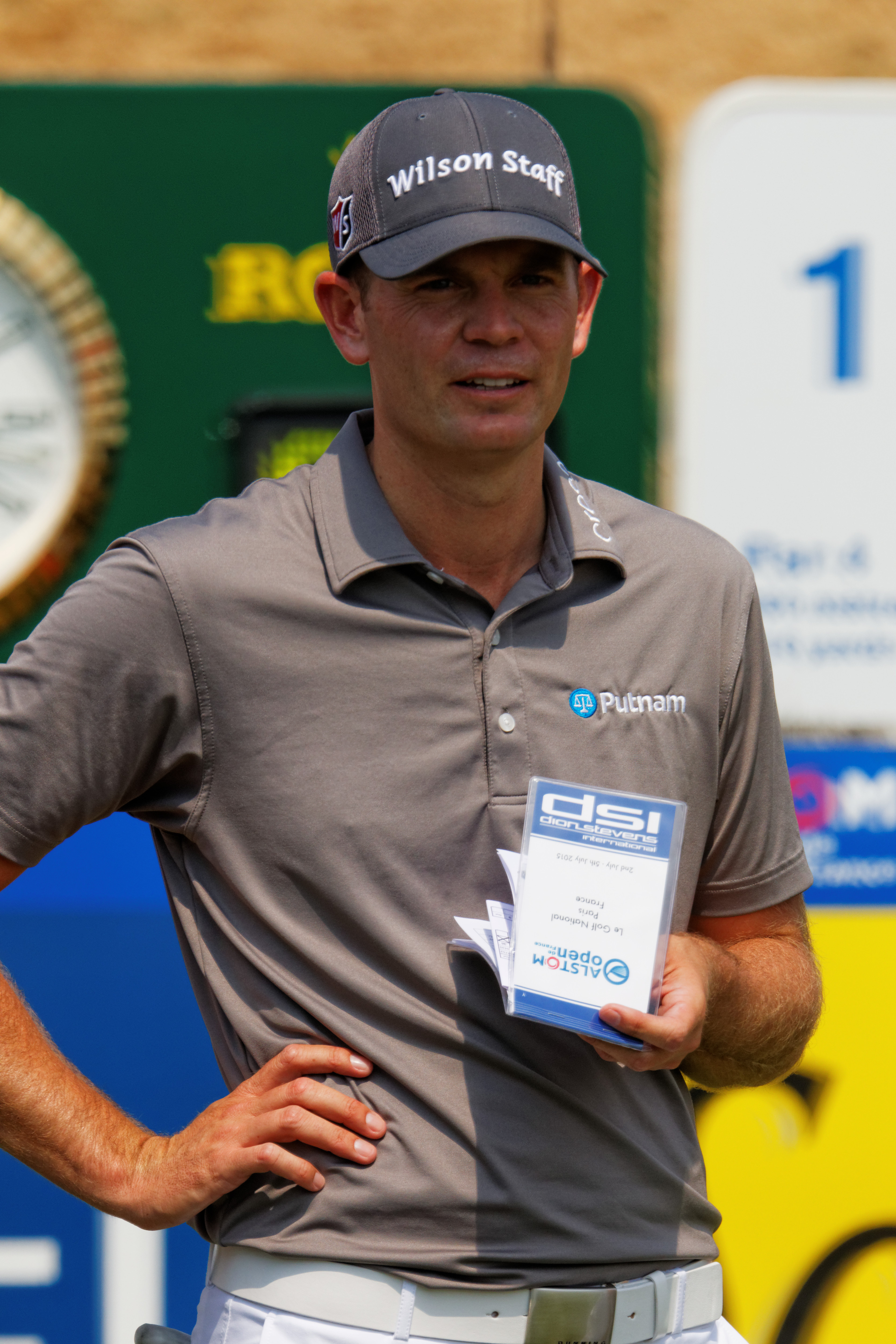 Photo prise lors l'Alstom - Open de France de Golf, en juil 2015